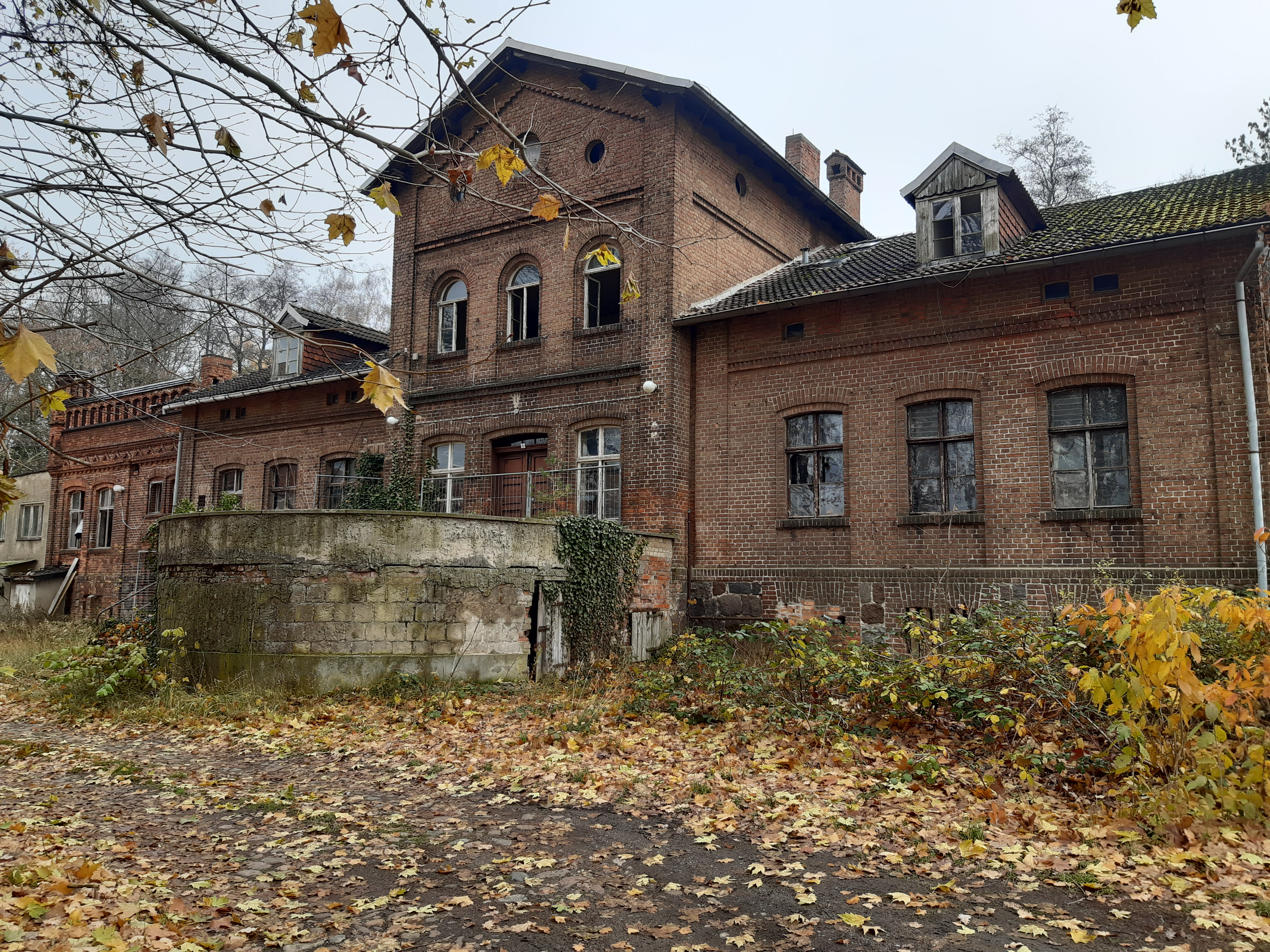 Gutshaus in Lübars (Möckern), Sachsen-Anhalt